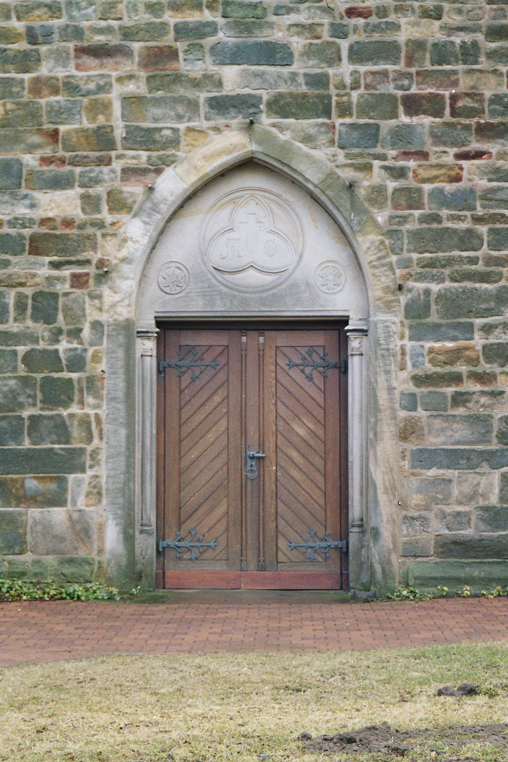 Der Haupteingang an der Westseite der Holtenser Kirche